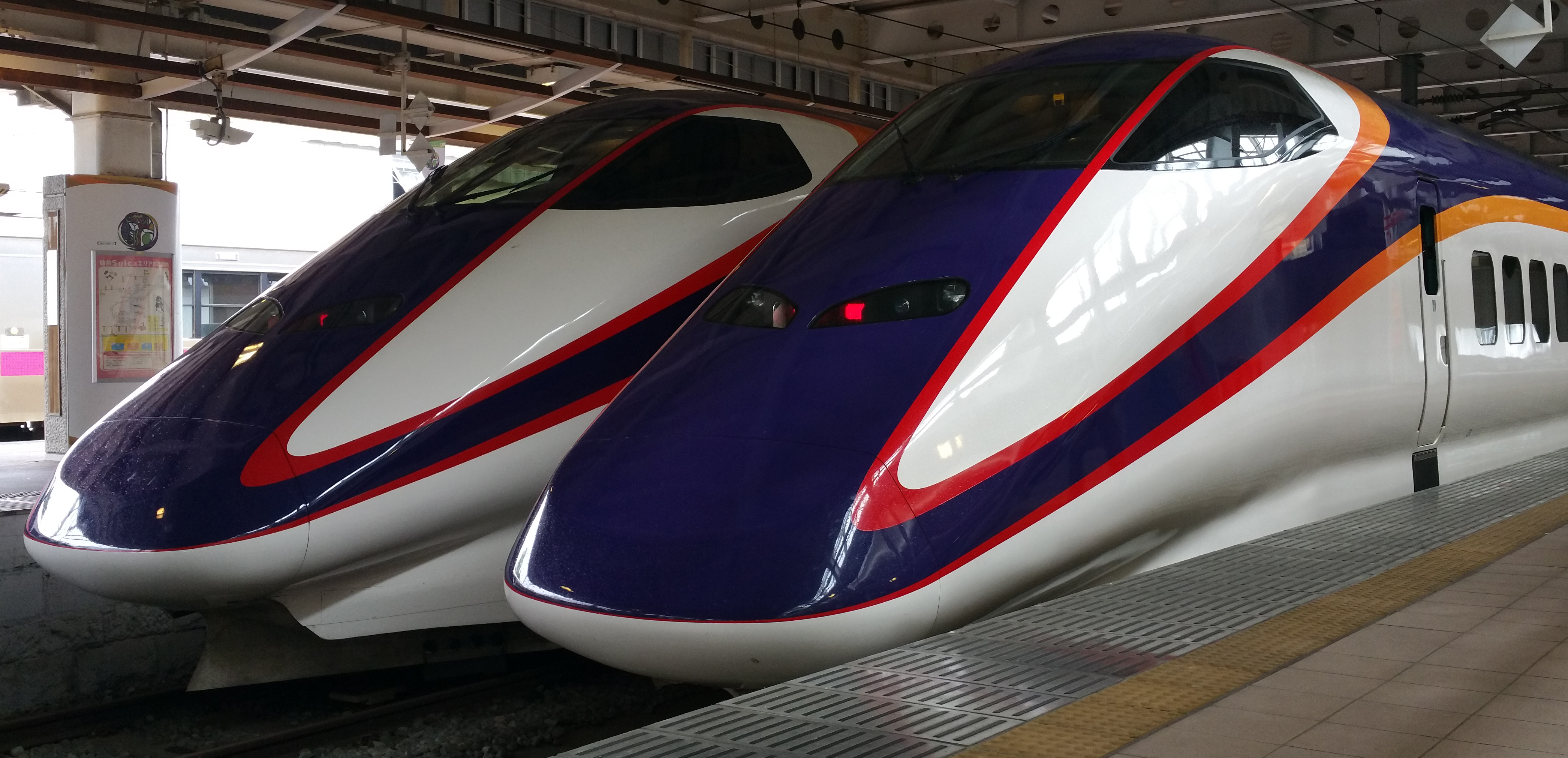 山形新幹線 新庄駅